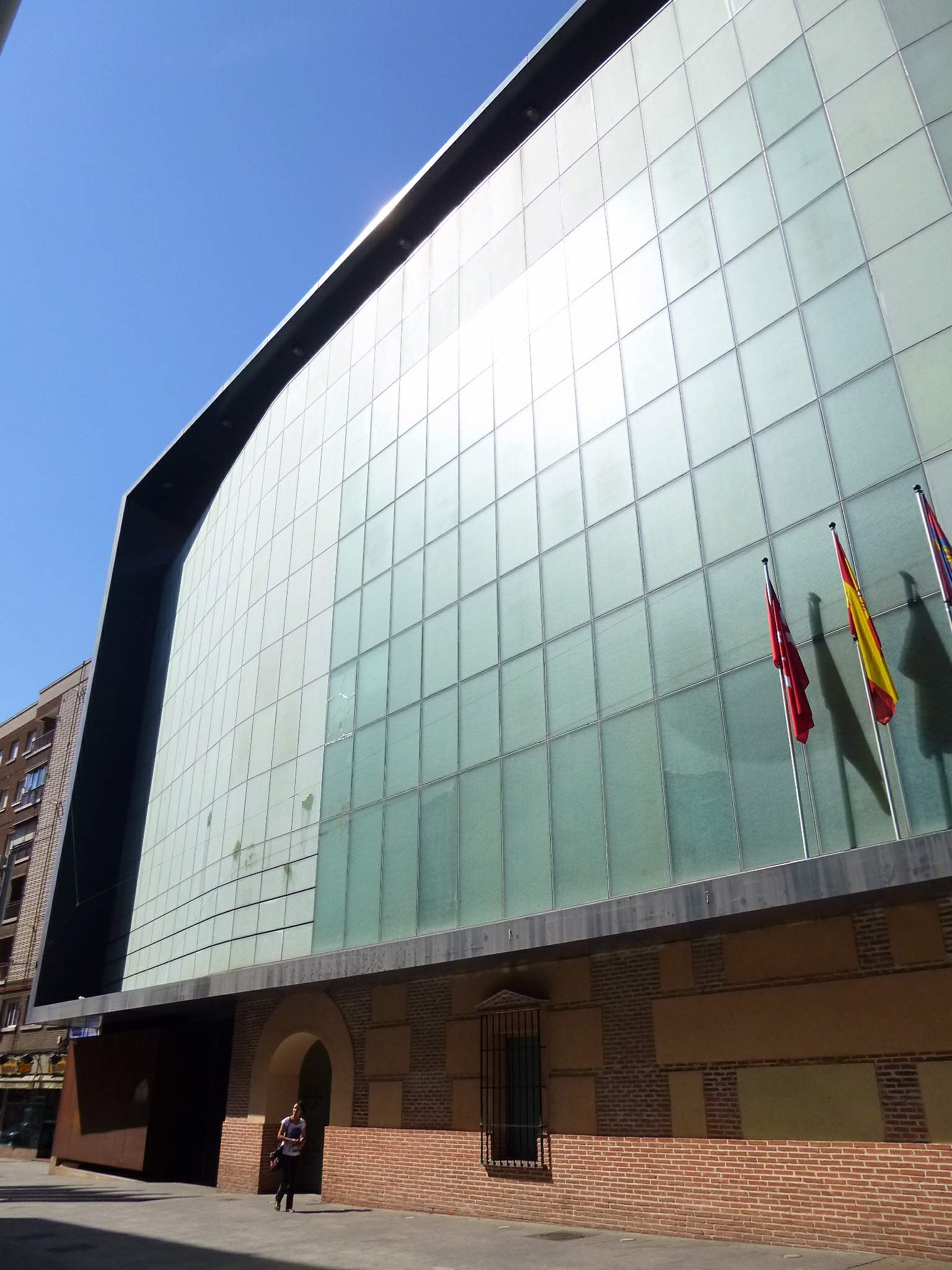 Centro de Arte Dos de Mayo (CA2M), en Móstoles